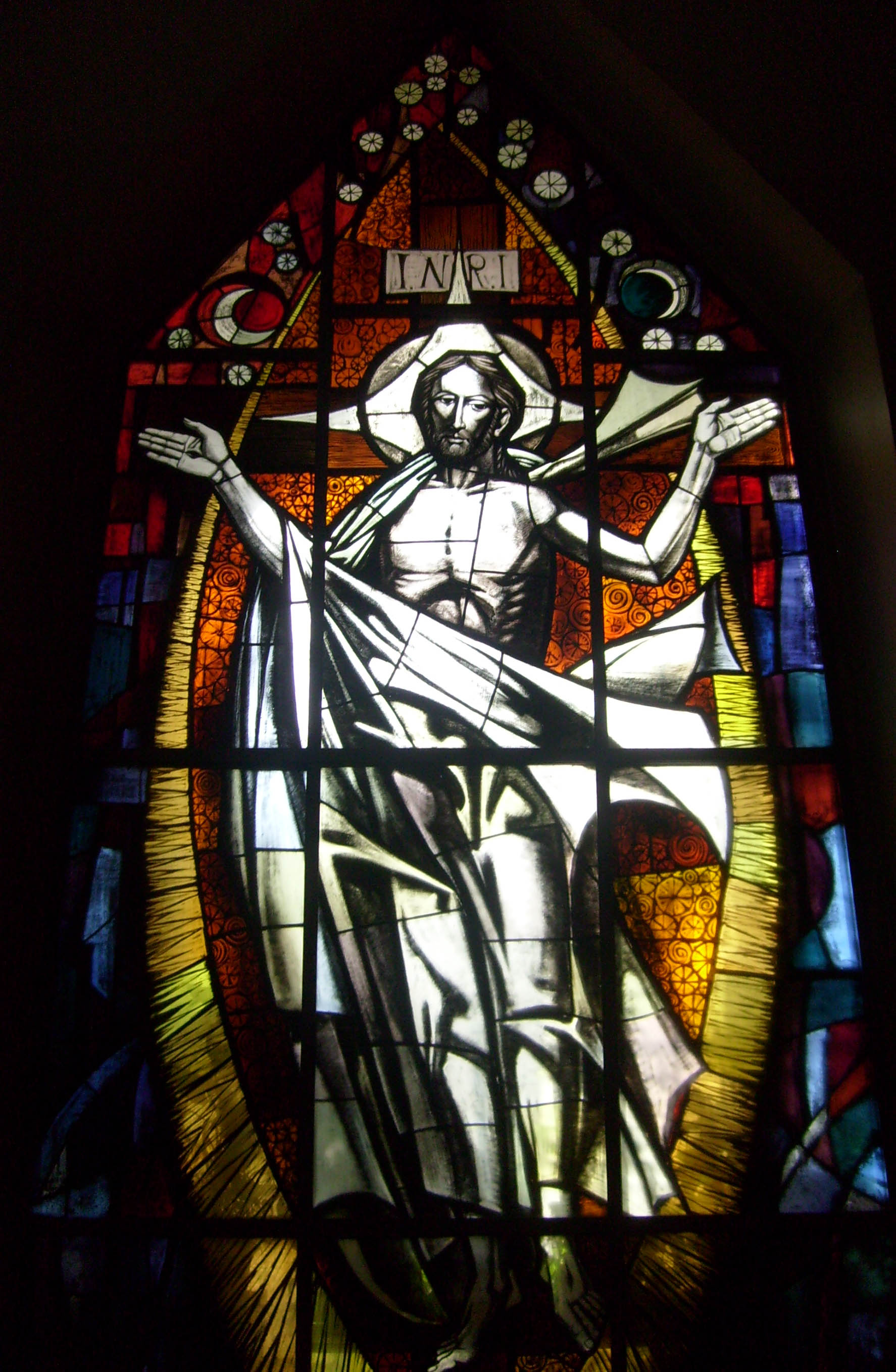 الرسم الزجاجي الرئيسي: (روديلي) المسيح المنتصر على الموت